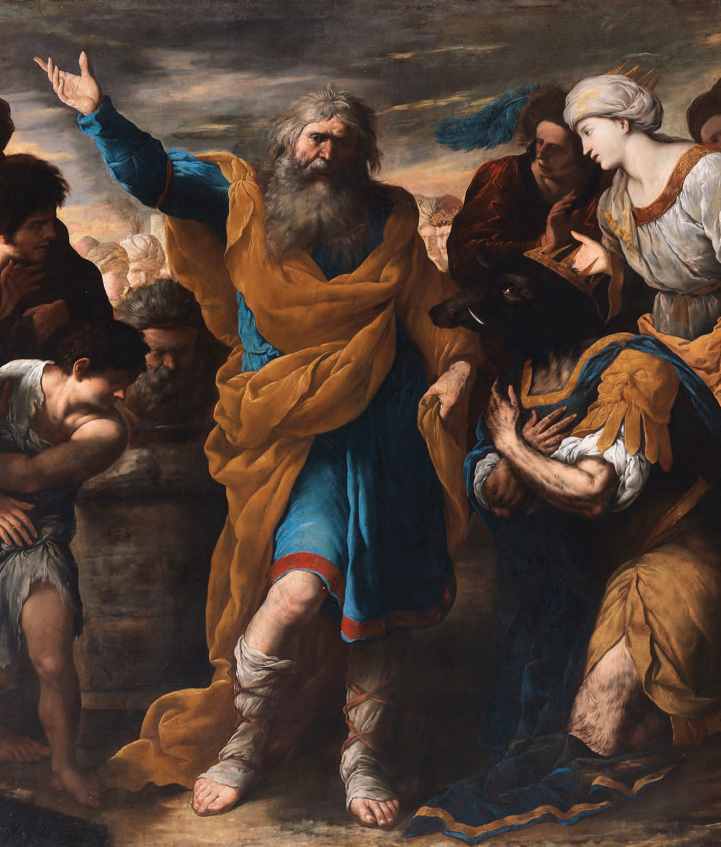 Il re Tiridate implora san Gregorio perché gli vengano restituite sembianze umane (dettaglio)